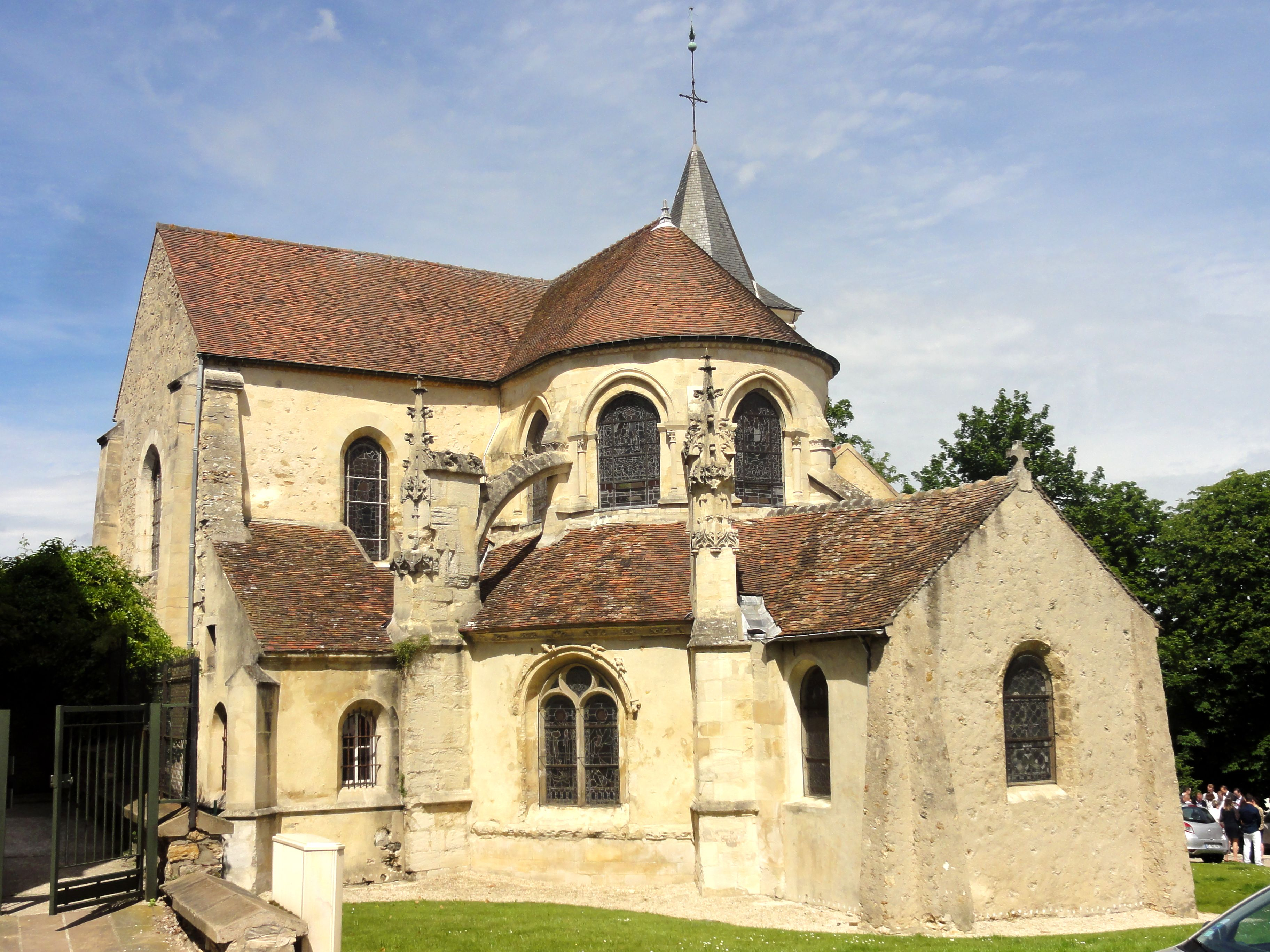 Chevet.